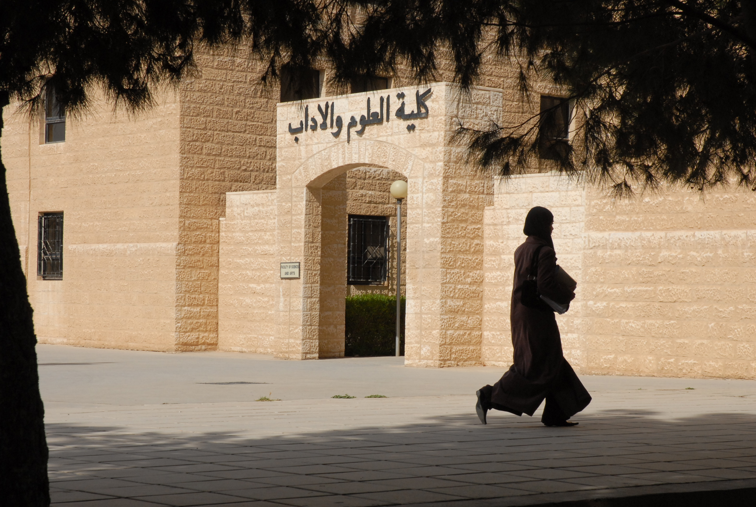 صور للجامعة